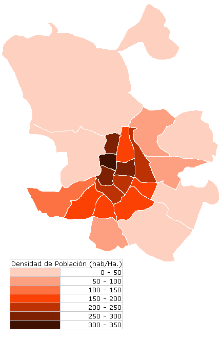 Densidad de Población de la ciudad de Madrid en el año 2005. Fuente [1]